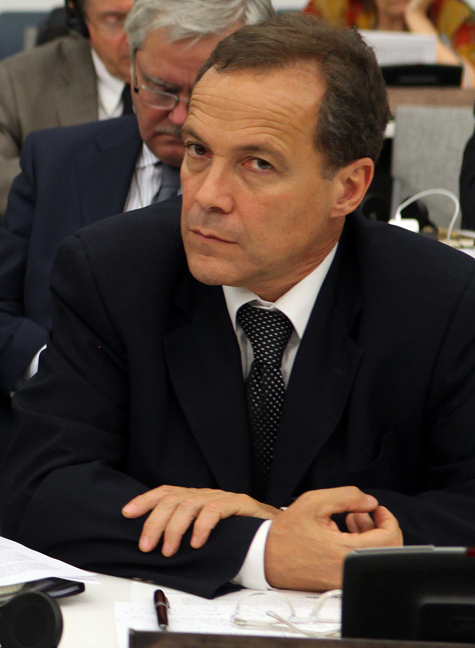 El Canciller Timerman durante su intervención en la Sesión Anual del Comité Especial de Descolonización de la ONU, acompañado por: de izq. a der. Embajador argentino ante las Naciones Unidas, Sr Jorge Argüello, y el senador Rubén Giustianiani del partido Socialista, 2da fila izq. a der. Diego Limeres, Representante argentino permanente alterno ante la ONU, Ruperto Godoy, del Frente para la Victoria, Julio Martínez de la UCR, y Federico Pinedo del PRO. Nueva York. 21 de junio de 2011.